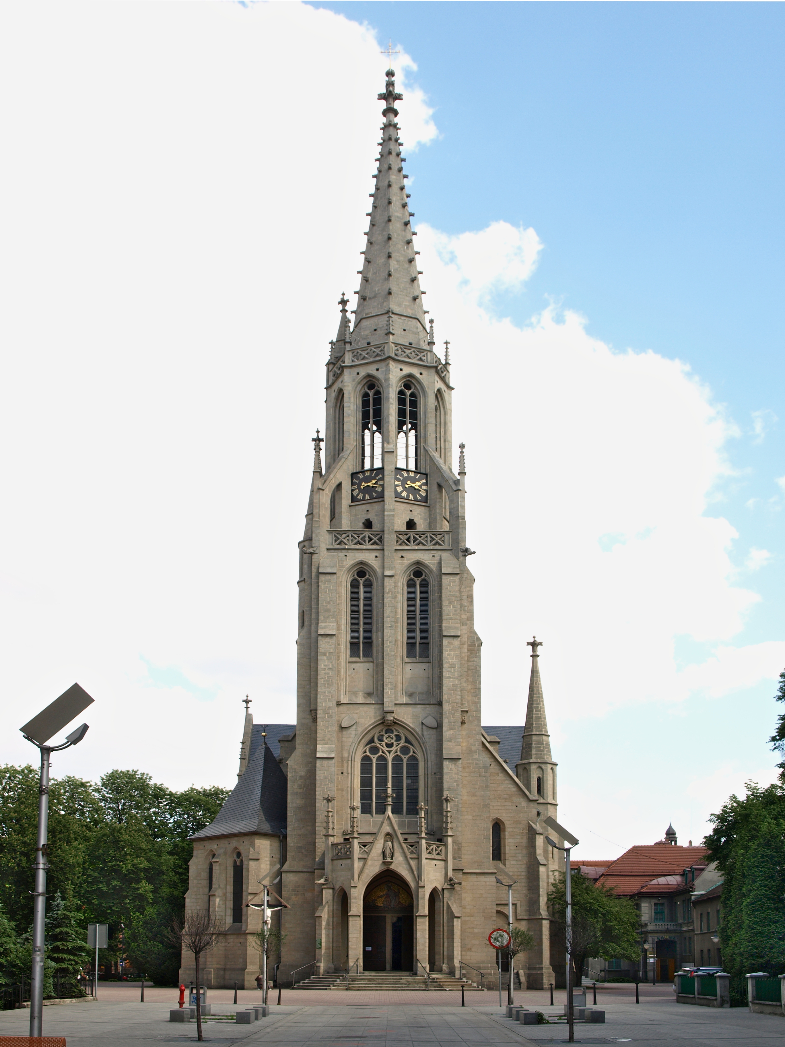 Katowice, pl. ks. E. Szramka 4 - negotycki kościół p.w. Niepokalanego Poczęcia Najświętszej Marii Panny (zabytek nr A/266/09 z 8 VII 2009)